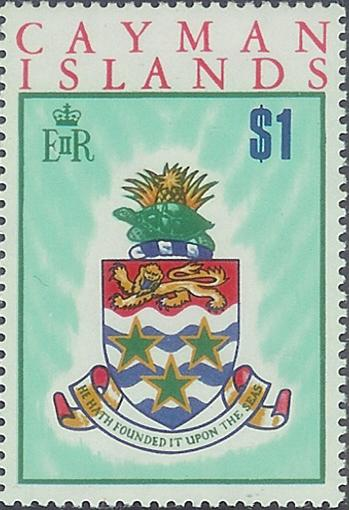 Timbre 242 Cayman.